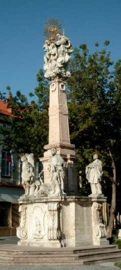 Pestkolono en Komárno (Slovakio)